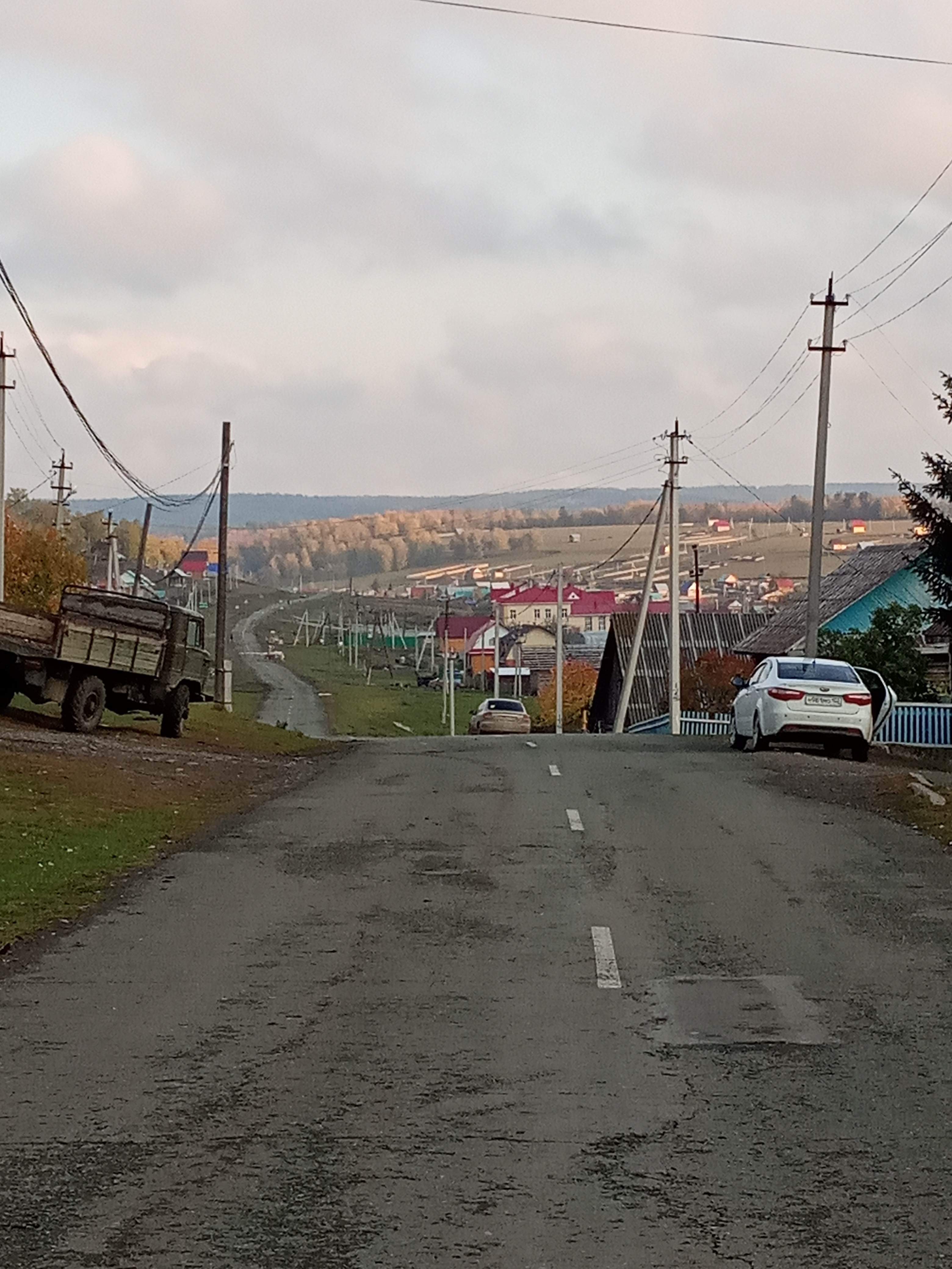 Соединились две деревни Бурзянского района